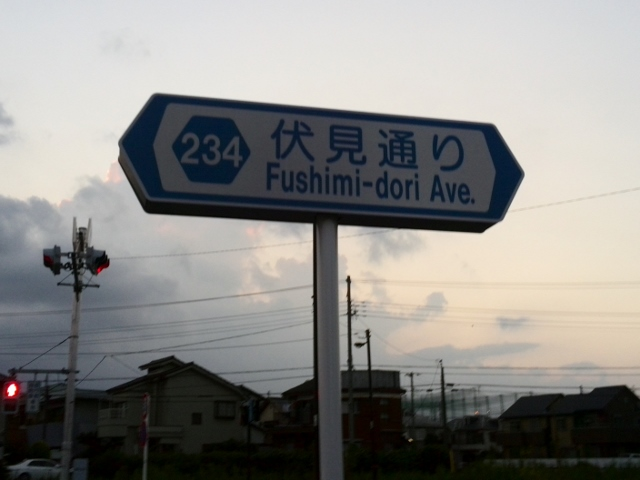 伏見通りの標識 西東京北町6丁目交差点付近で撮影